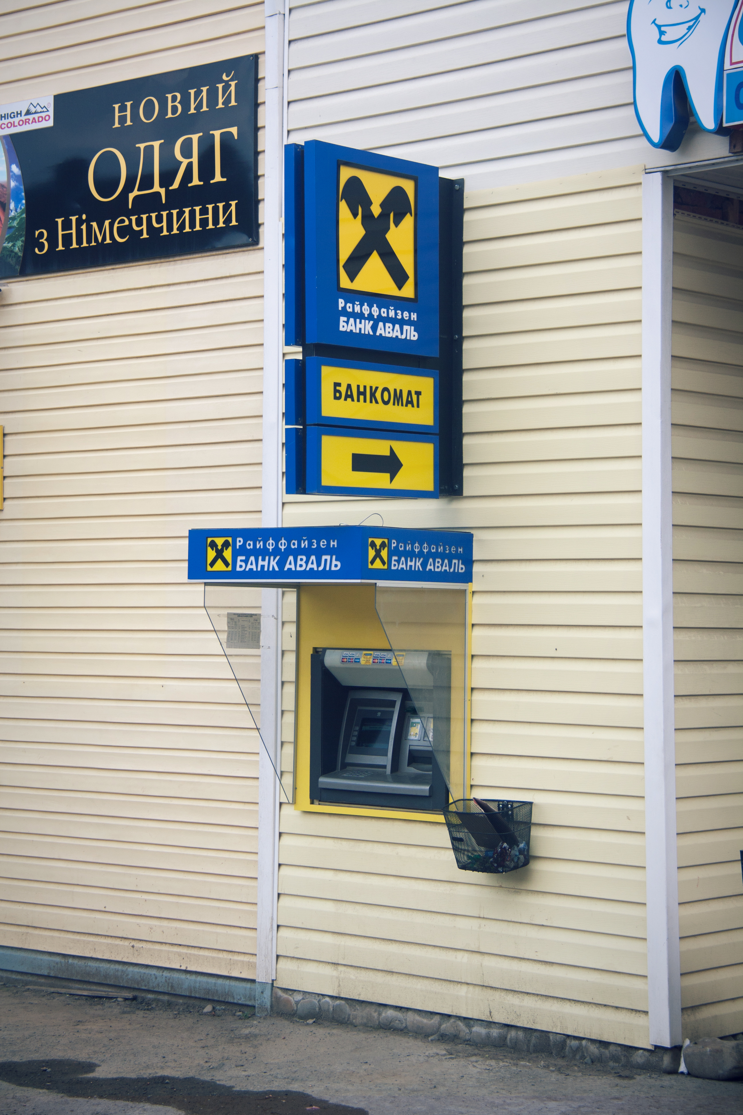 Verkhovyna, Ucrania